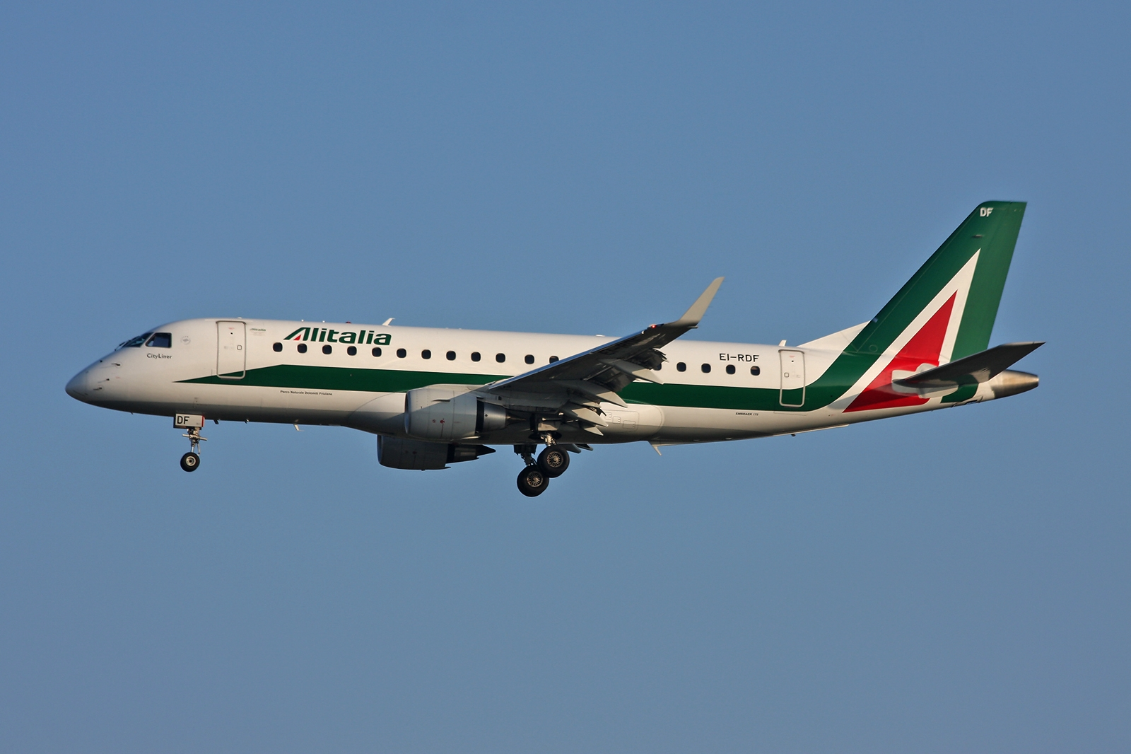 Frankfurt am Main (Rhein-Main AB) (FRA / EDDF / FRF) Germany 9.2013